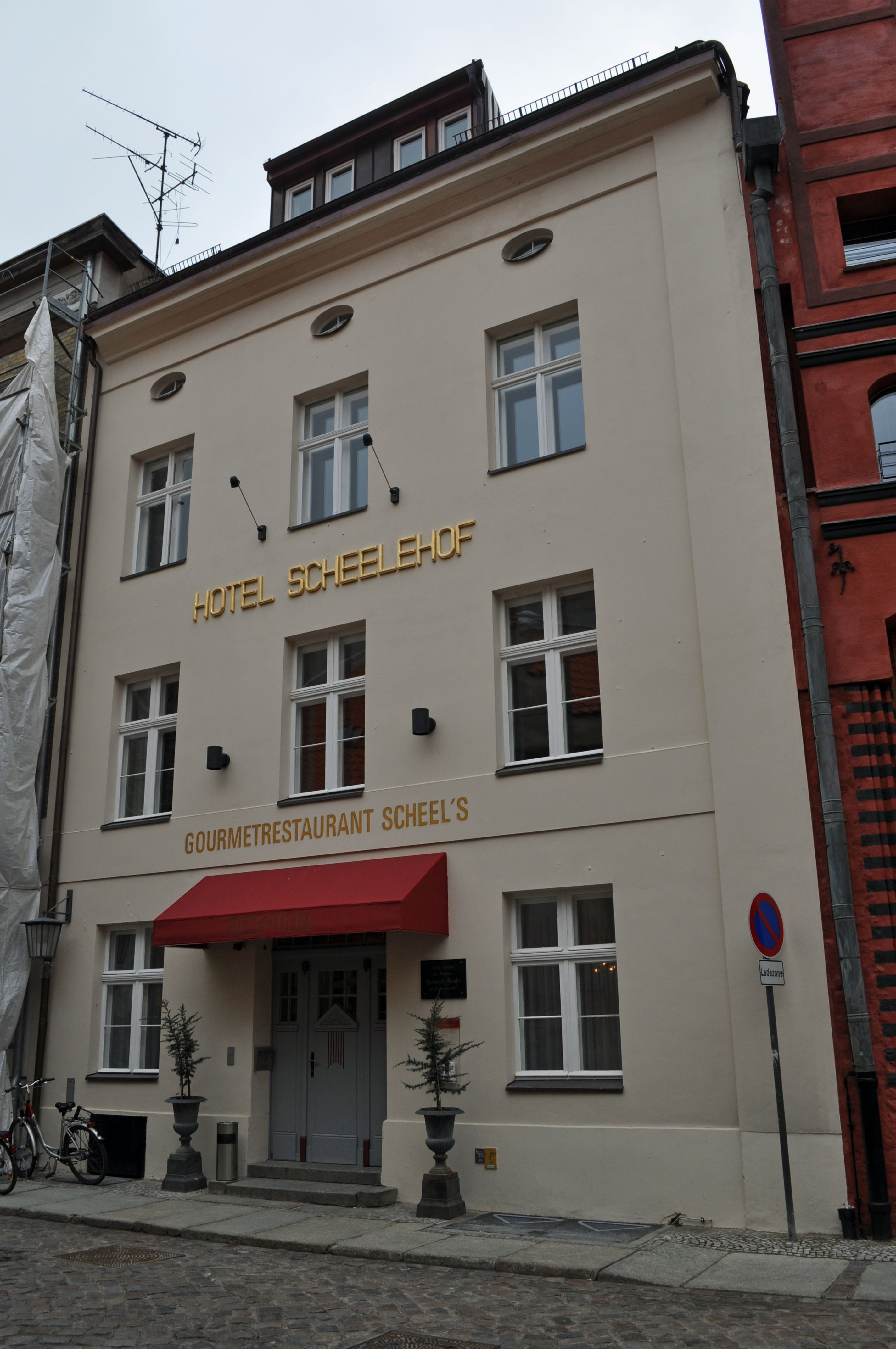 Gebäude bzw. Gebäudedetail in Stralsund. Straße und Hausnummer siehe Dateiname.